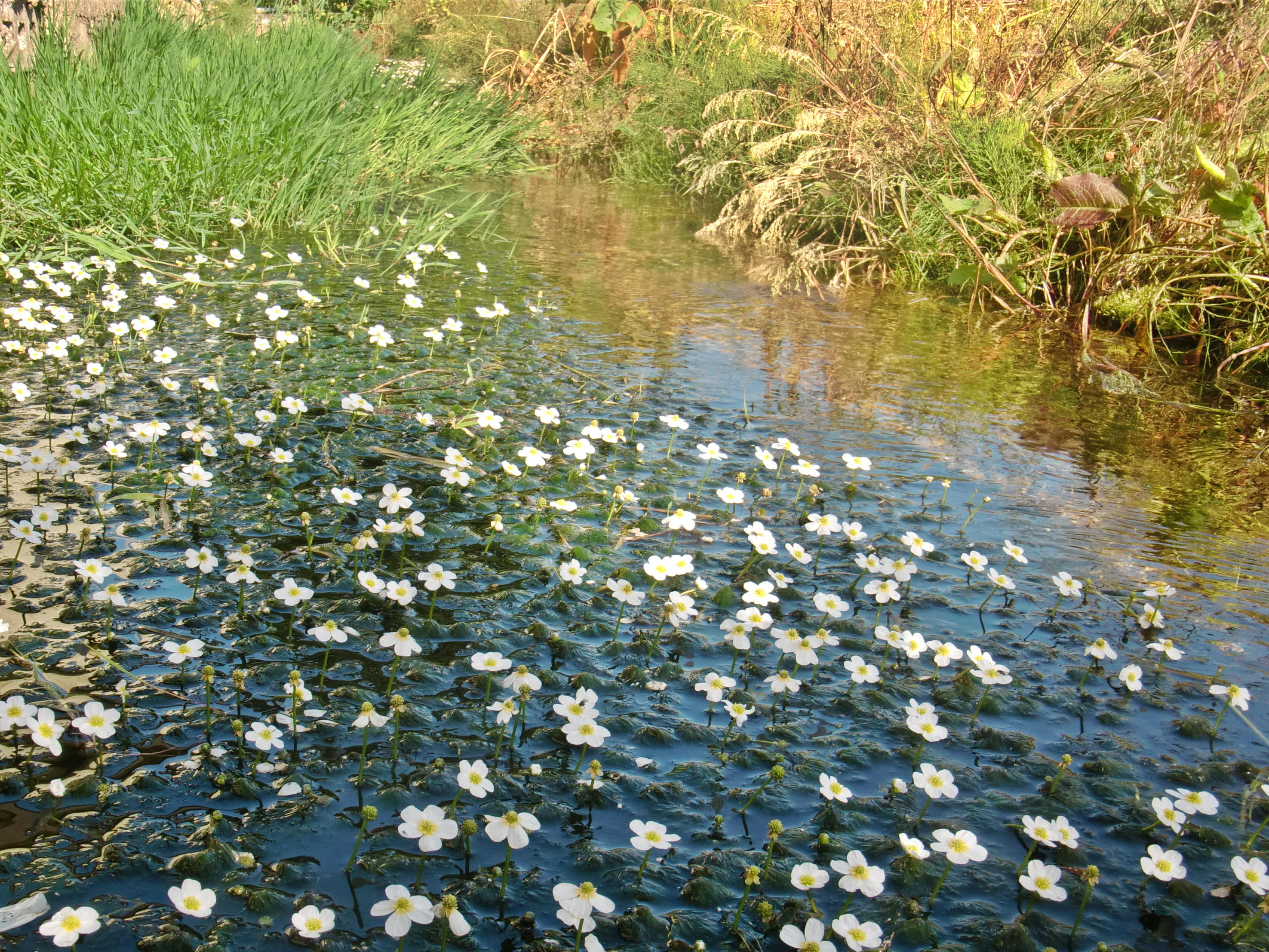 郡山市湖南町中野 清水川の金魚草（梅花藻）